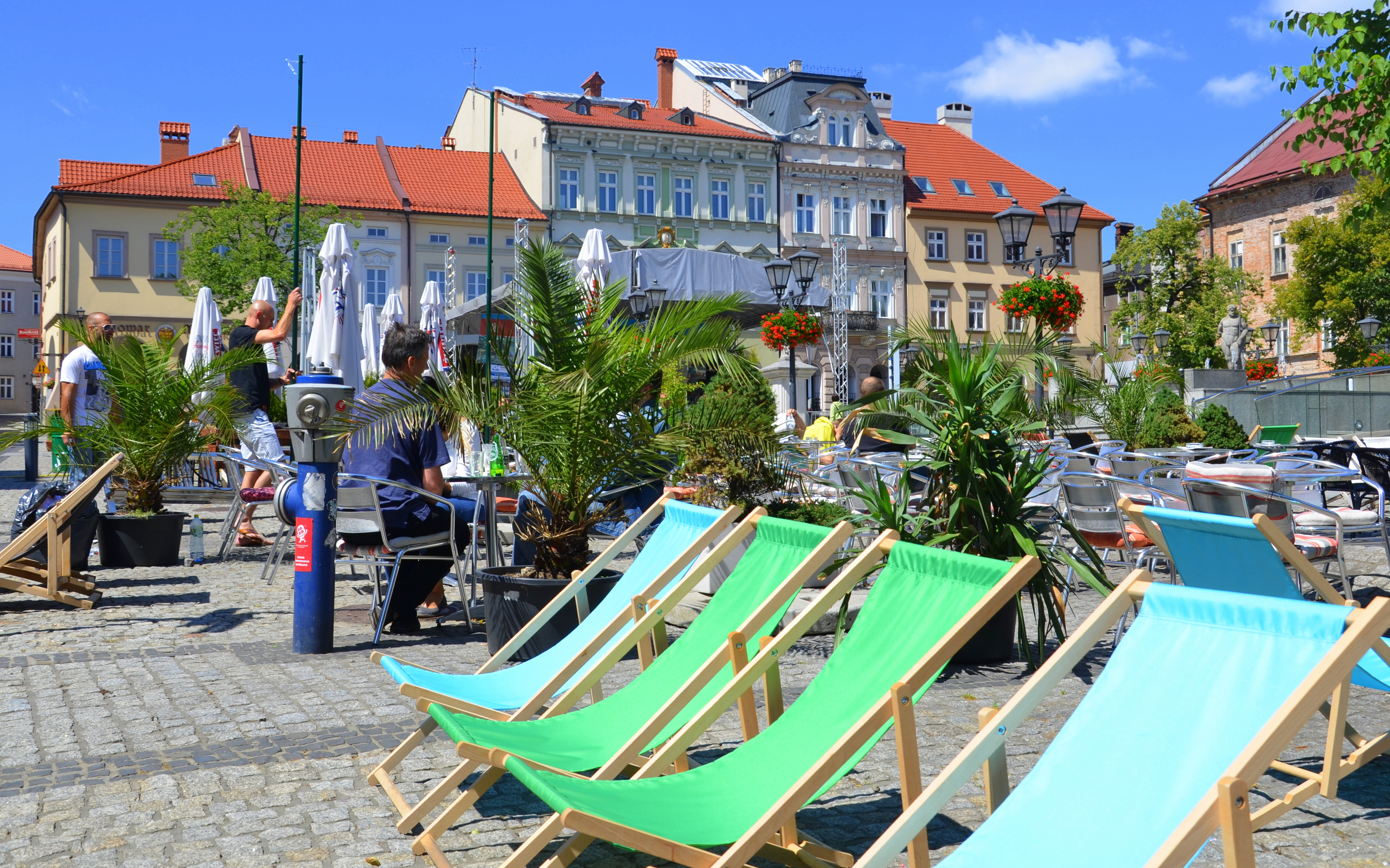 Der Markt in Bielitz, Bielsko 2015